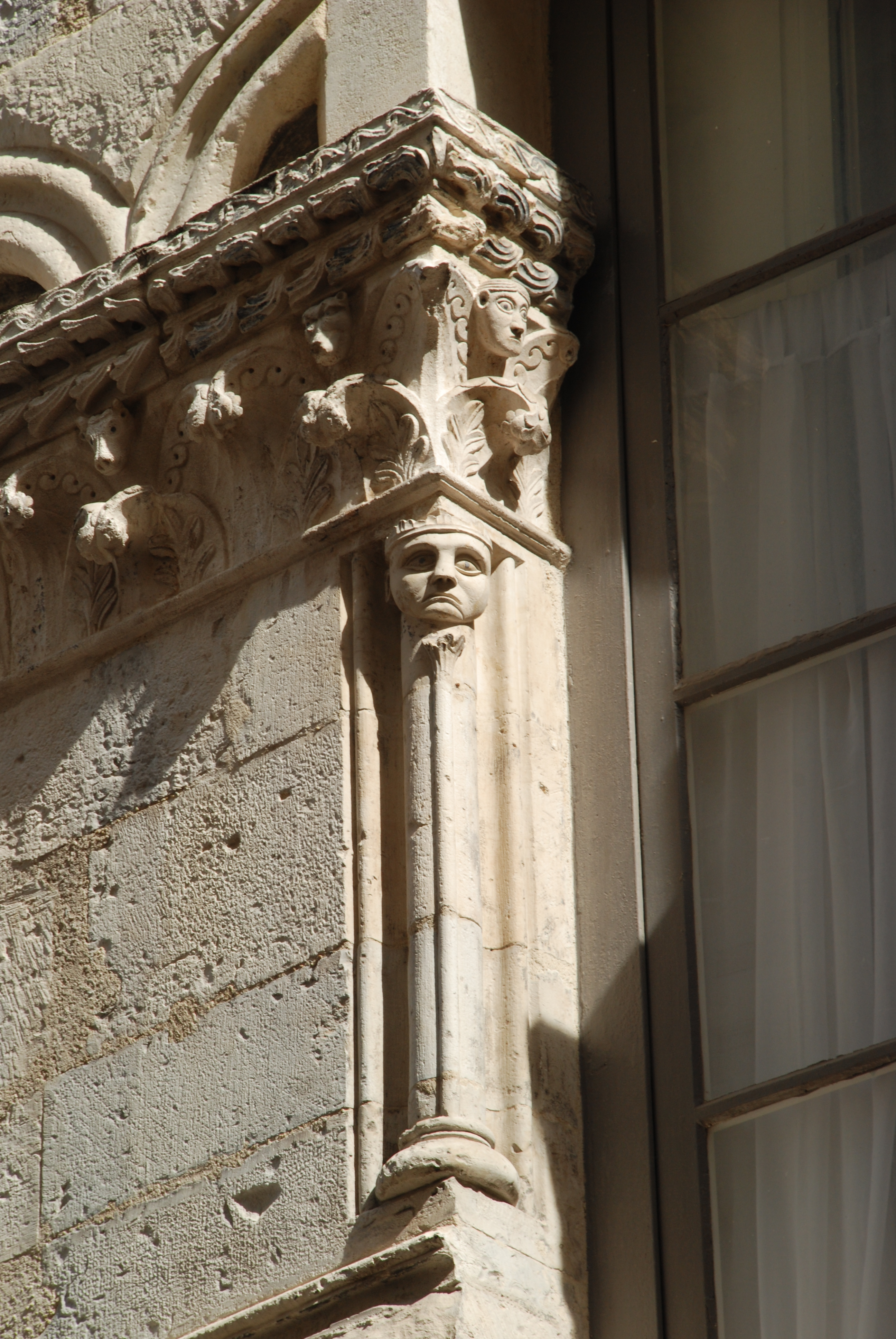 France - Provence - Maison romane de Nîmes